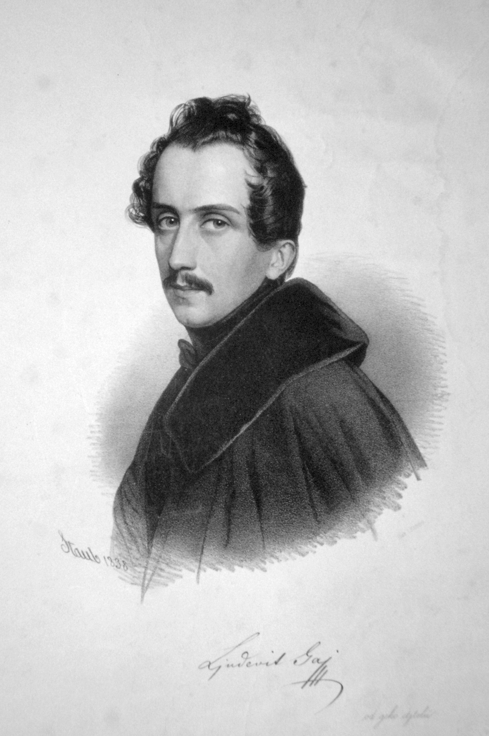 Ludwig Gaj (1809-1872), kroatischer Philologe, Schriftsteller, Dichter. Lithographie.